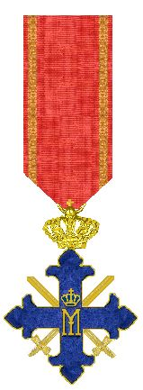 Orde 1944 IIIe Klasse